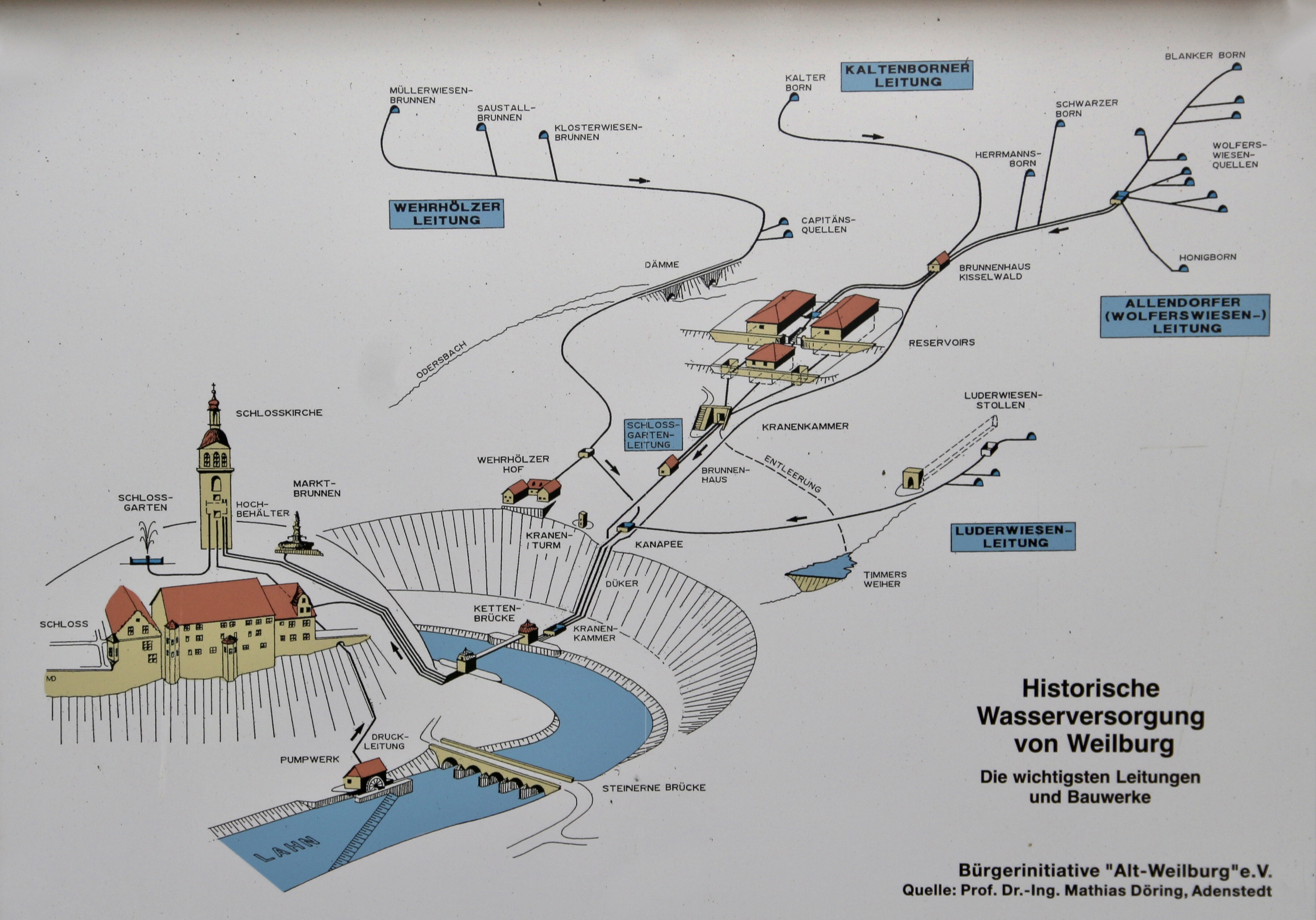 Weilburg